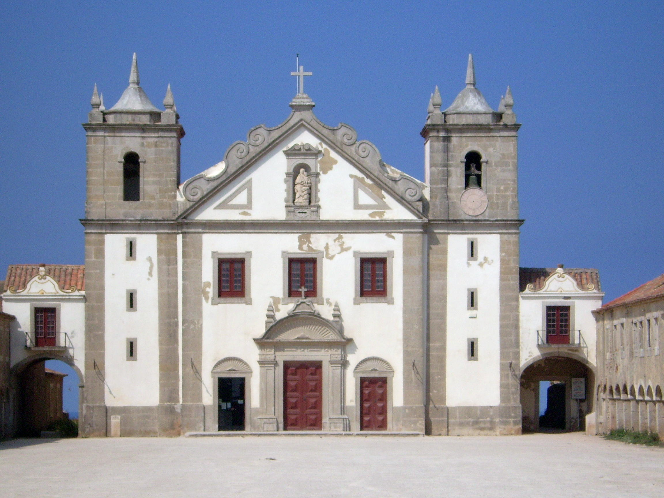 Igreja de Nossa Senhora do Cabo - frente Local : Cabo Espichel / Sesimbra / Portugal user:sacavem (pt) (usuário:sacavem)